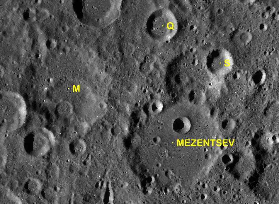 Cráter lunar Mezentsev. Cráteres satélite. (Imagen LRO)